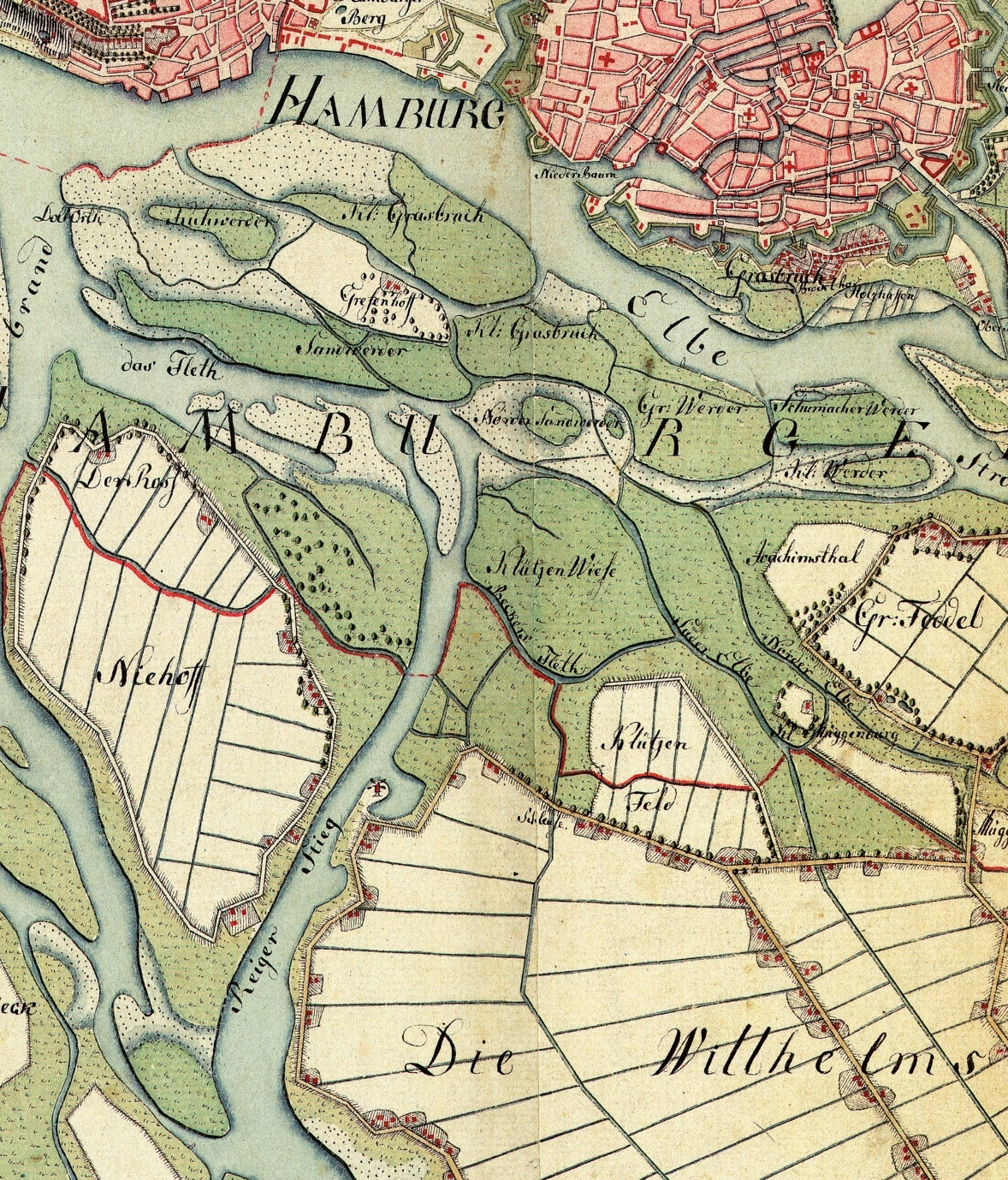 Altona, Hamburg, Harburg. Aufgenommen in den Jahren 1789 bis 1796 unter der Direktion des Majors Gustav Adolf von Varendorf durch Offiziere des Schleswigschen Infanterieregiments